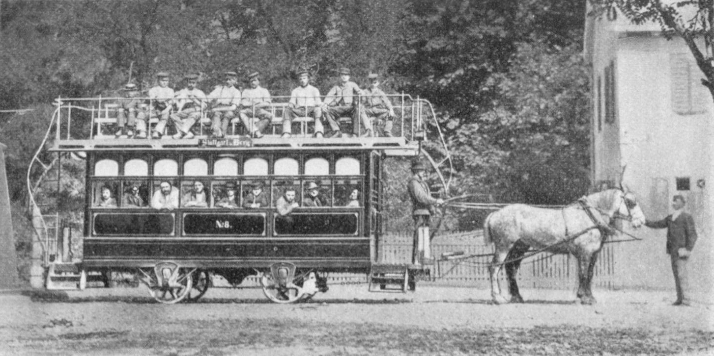 Stuttgarter Pferdebahn, Wagen der Pferdeeisenbahn Stuttgart-Berg, nach 1868.